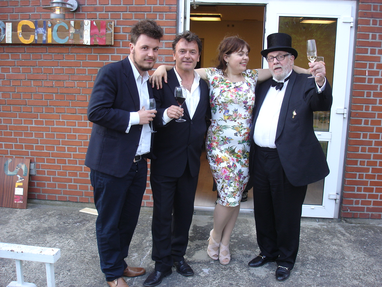 Claude Chichon fejres efter æreskunstnerkåringen i Østermarie af sin søn, operasangeringen Ingeborg Børch og KulturBornholms præsident Carsten Seeger